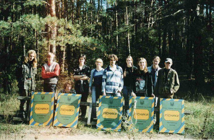 Заказник Лісники, 2001 рік